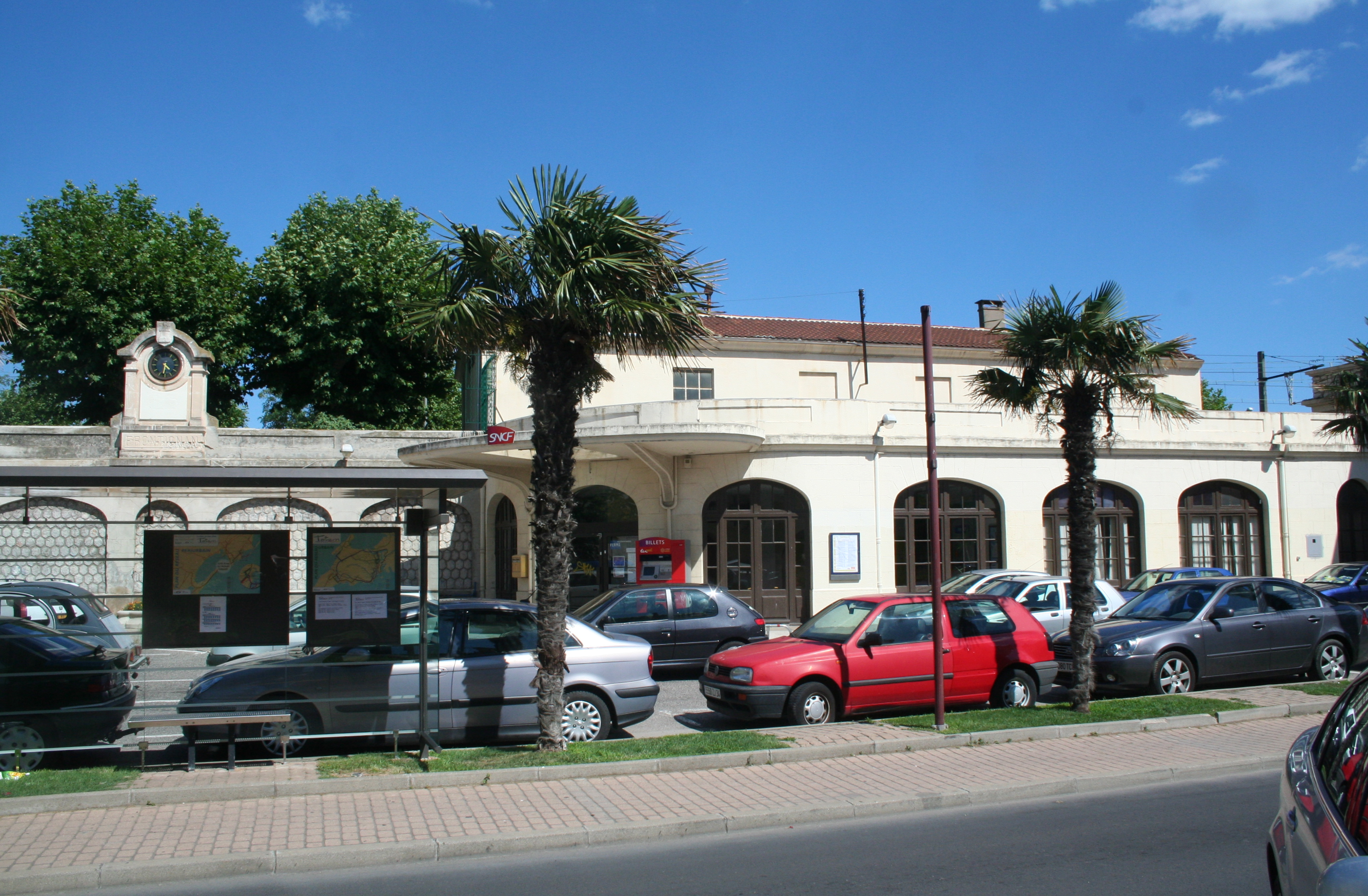 Frontignan (Hérault) - gare SNCF.